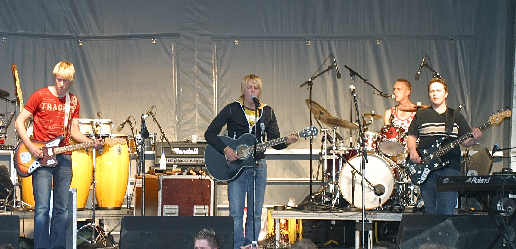 Håkon Njøten and band